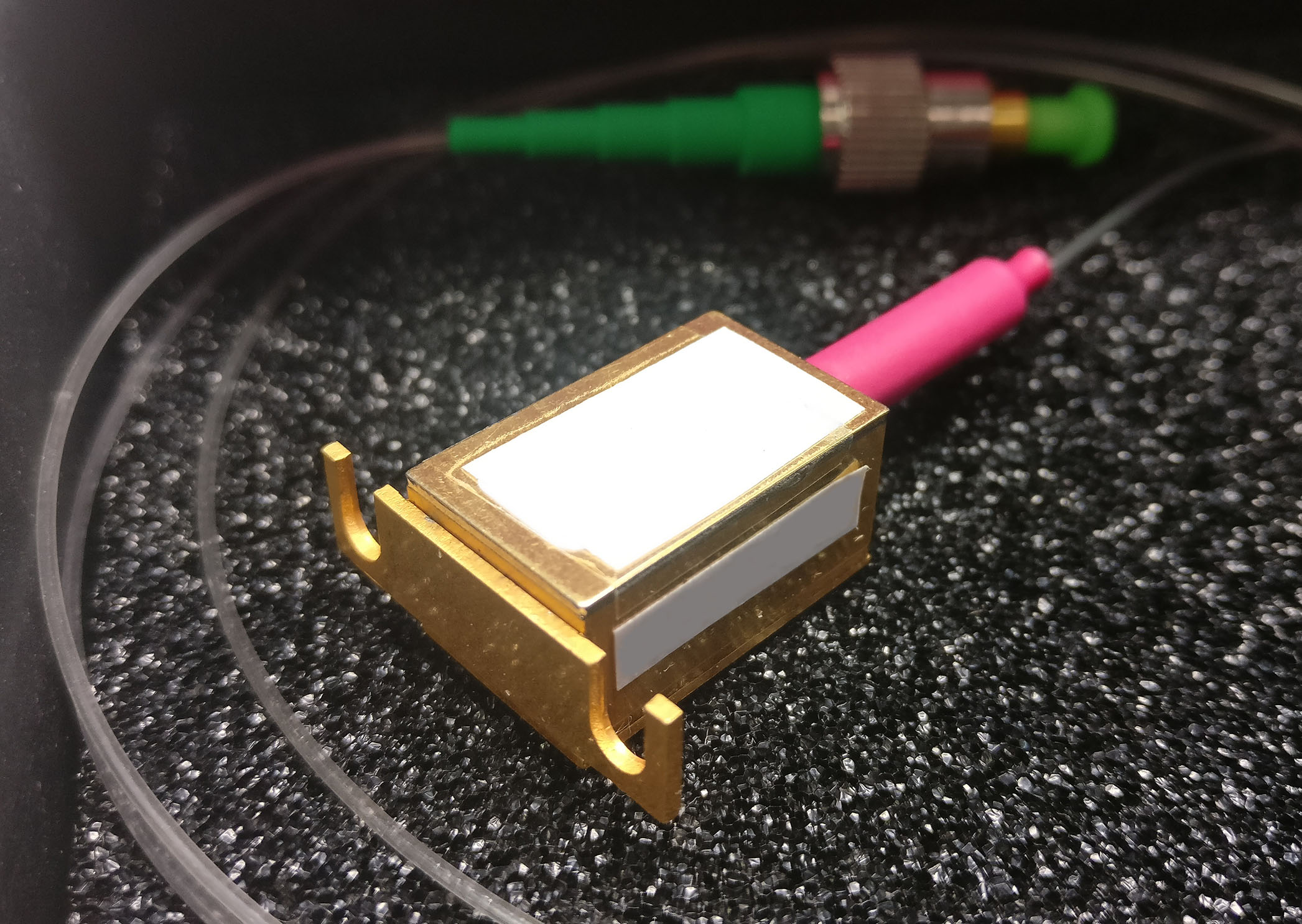 Корпус лазерного диода Dual-In-Line